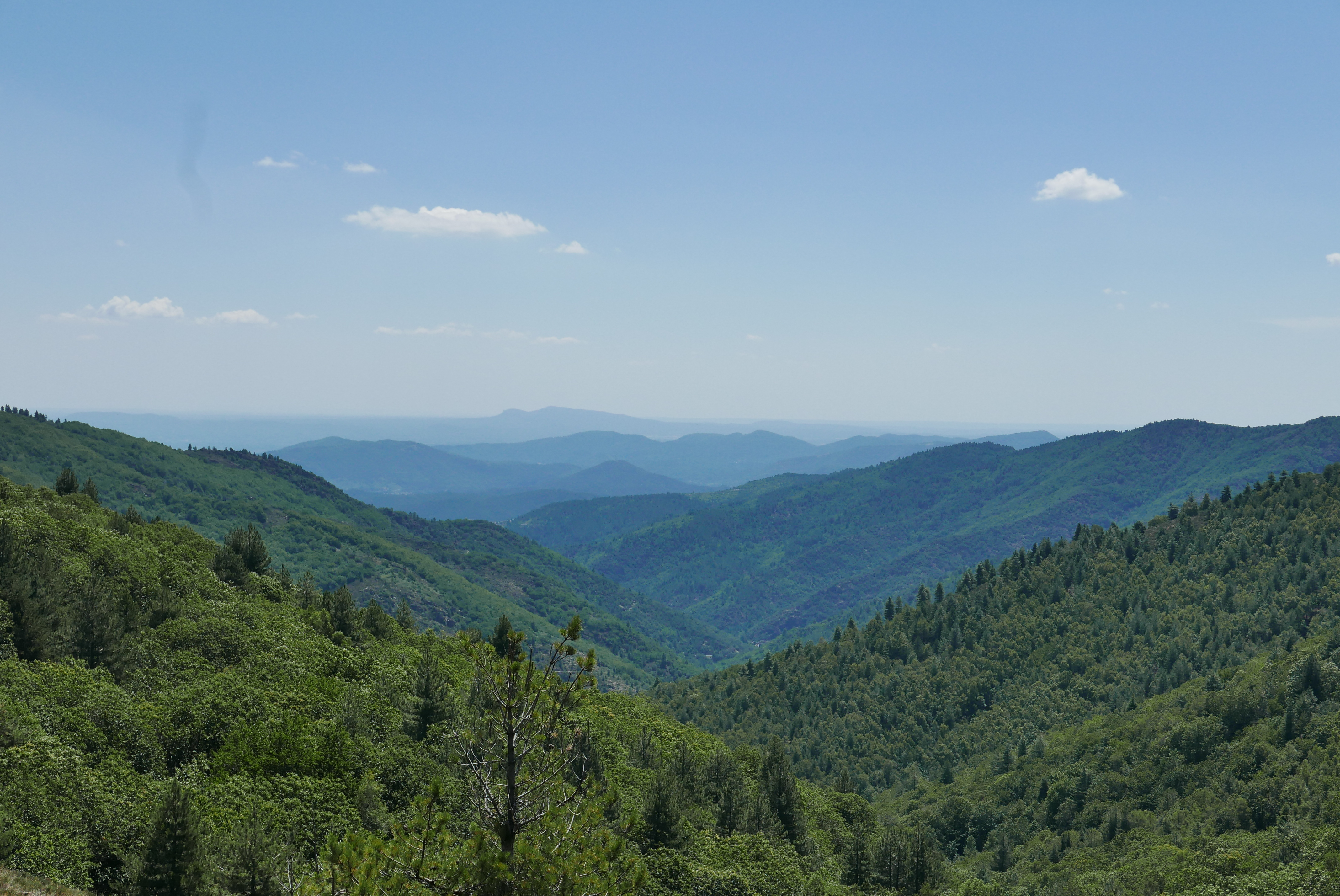 Paysages cévenoles